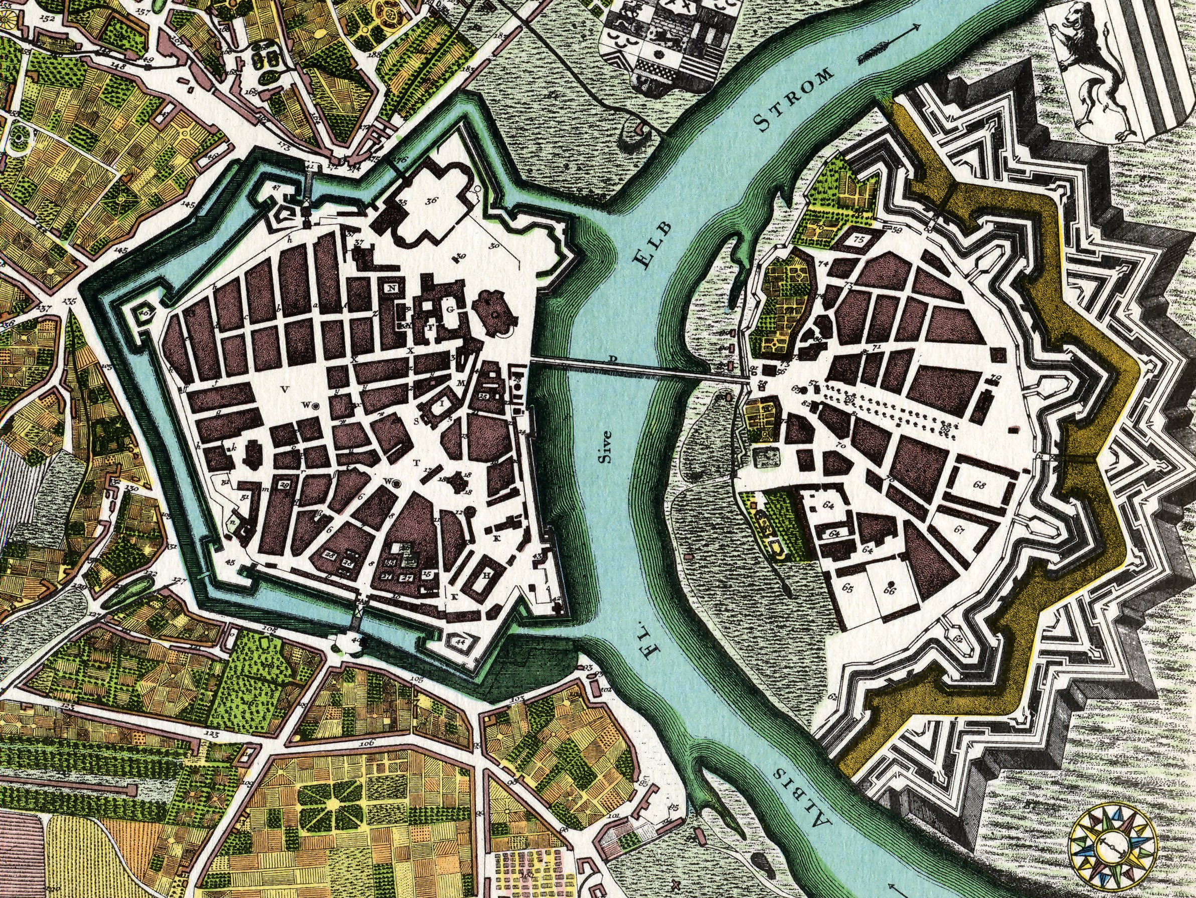 Stadtplan von Dresden, angefertigt von Matthäus Seutter. (Kolorierter Kupferstich aus dem Jahre 1750.)